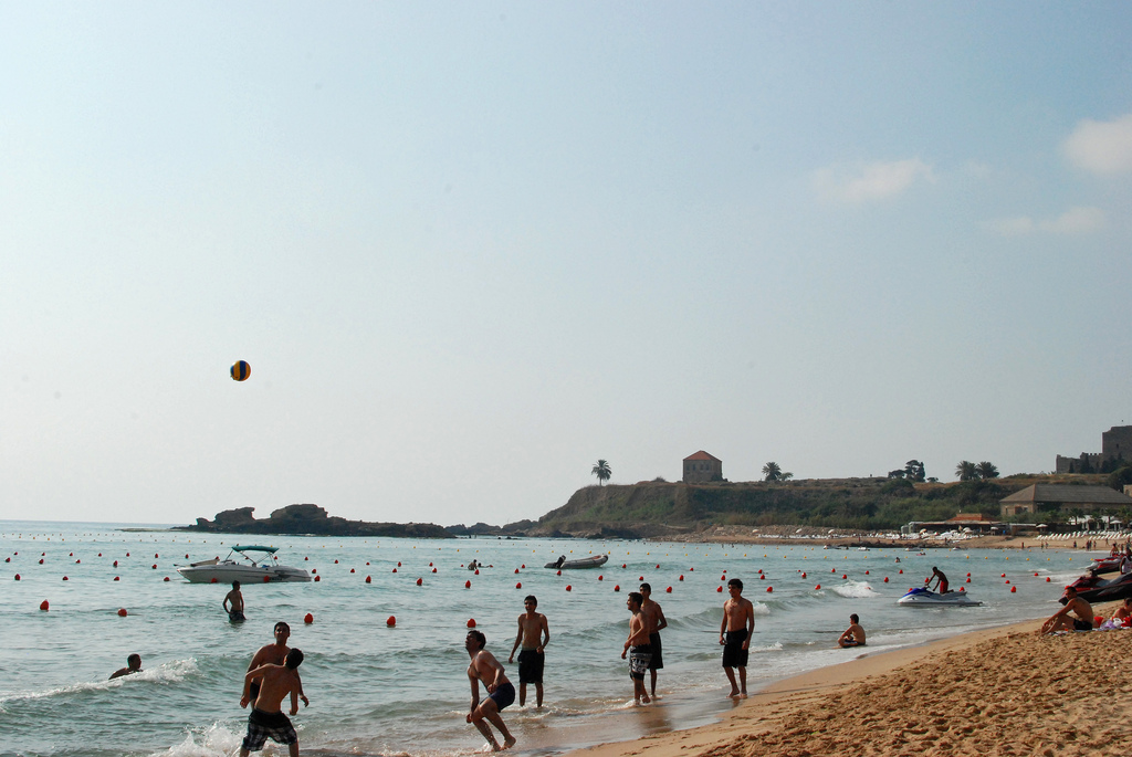 byblos, lebanon